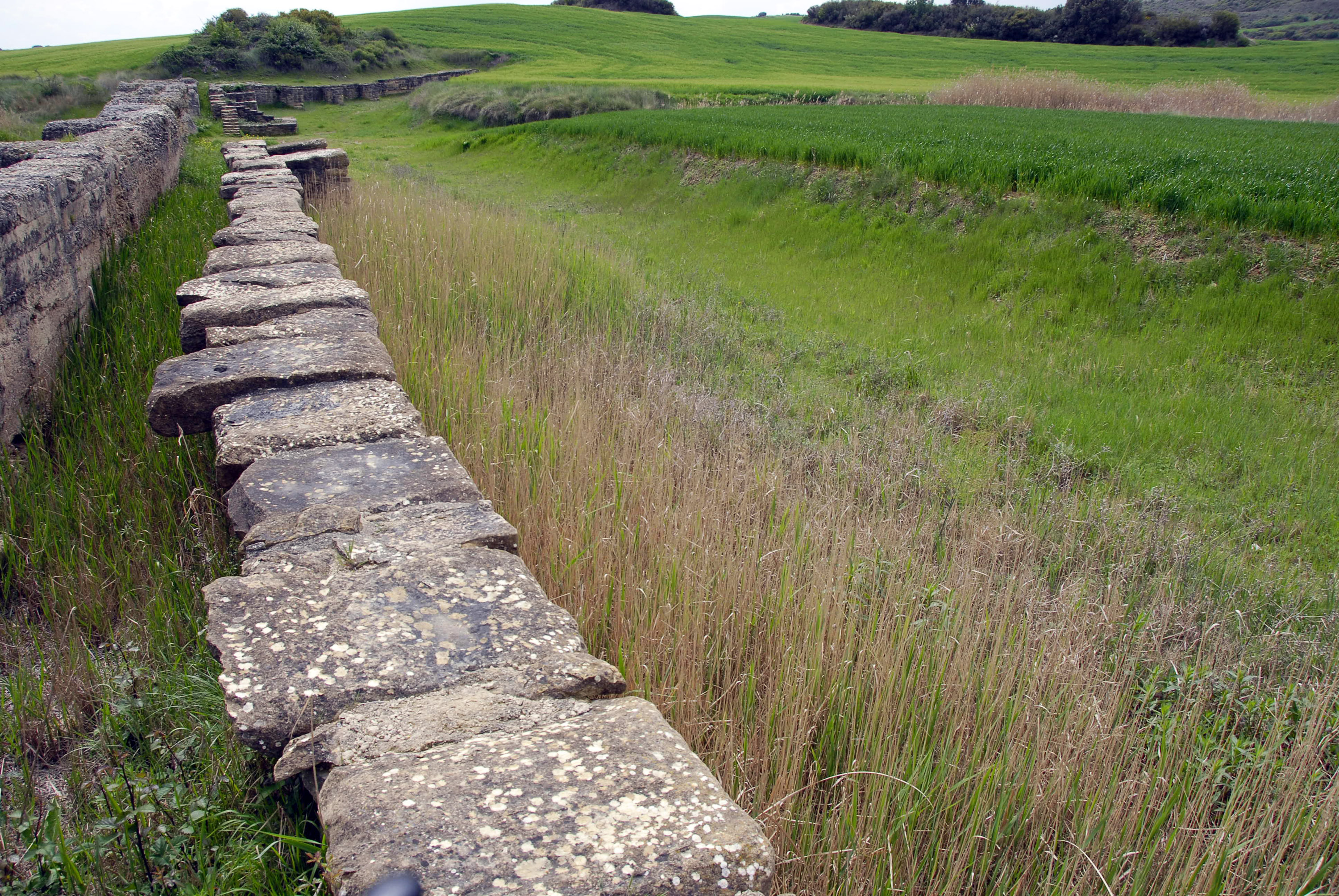 Presa de Iturranduz, Yacimiento de Andelos, localizado en Mendigorría (Navarra) España.